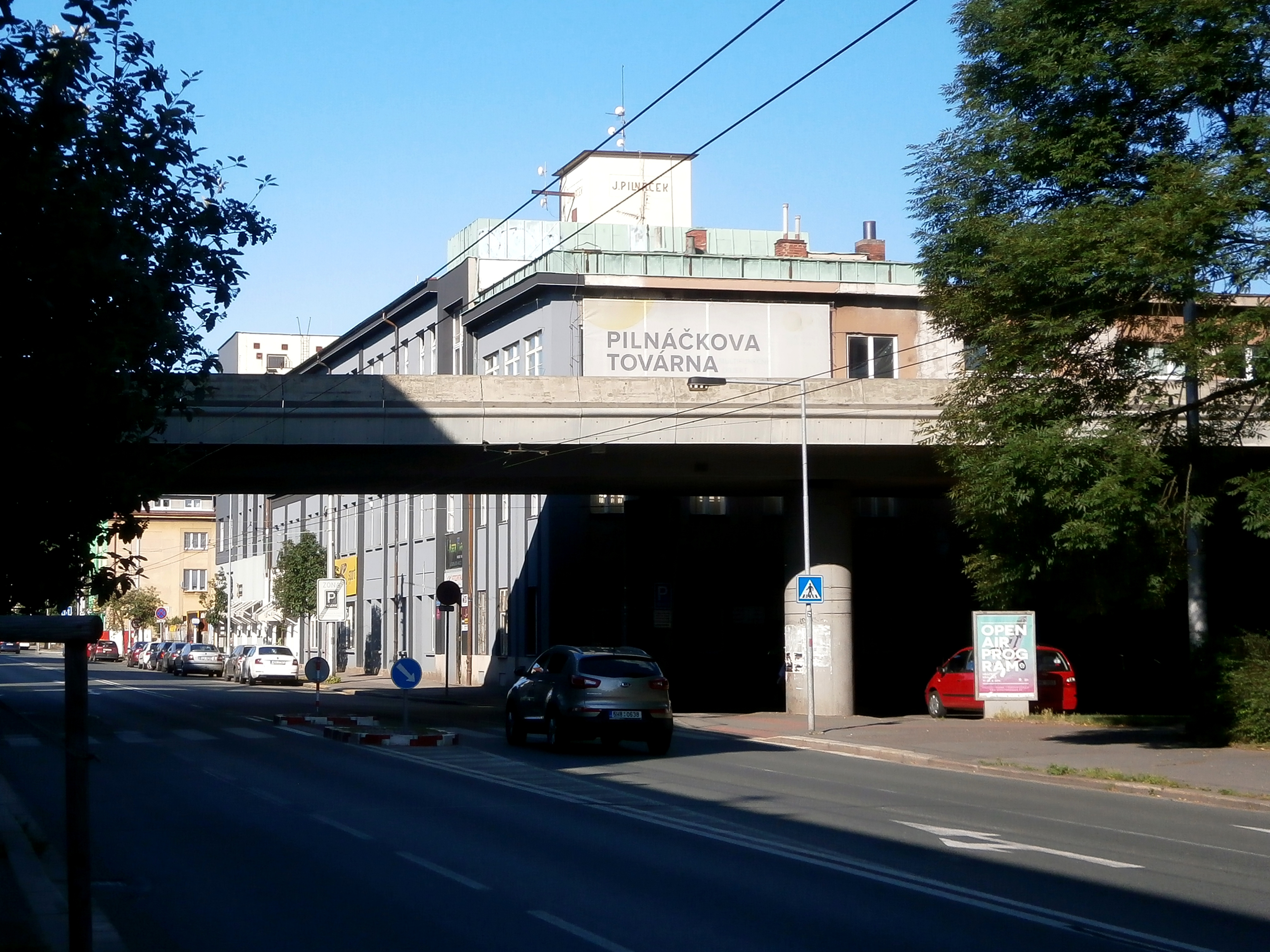 Pilnáčkova továrna (Hradec Králové)